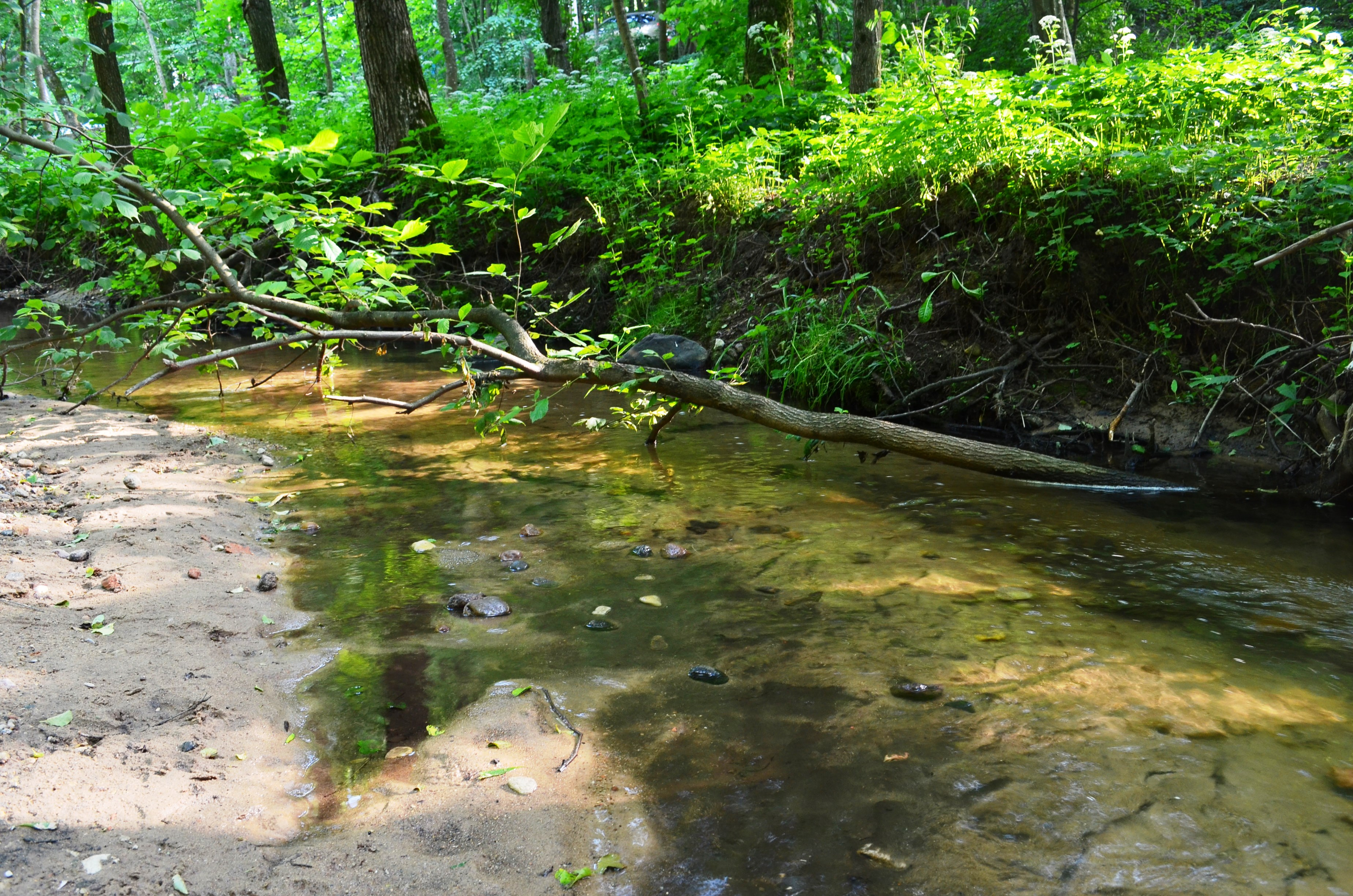 Verkės upelis šalia Verkių rūmų, Vilnius